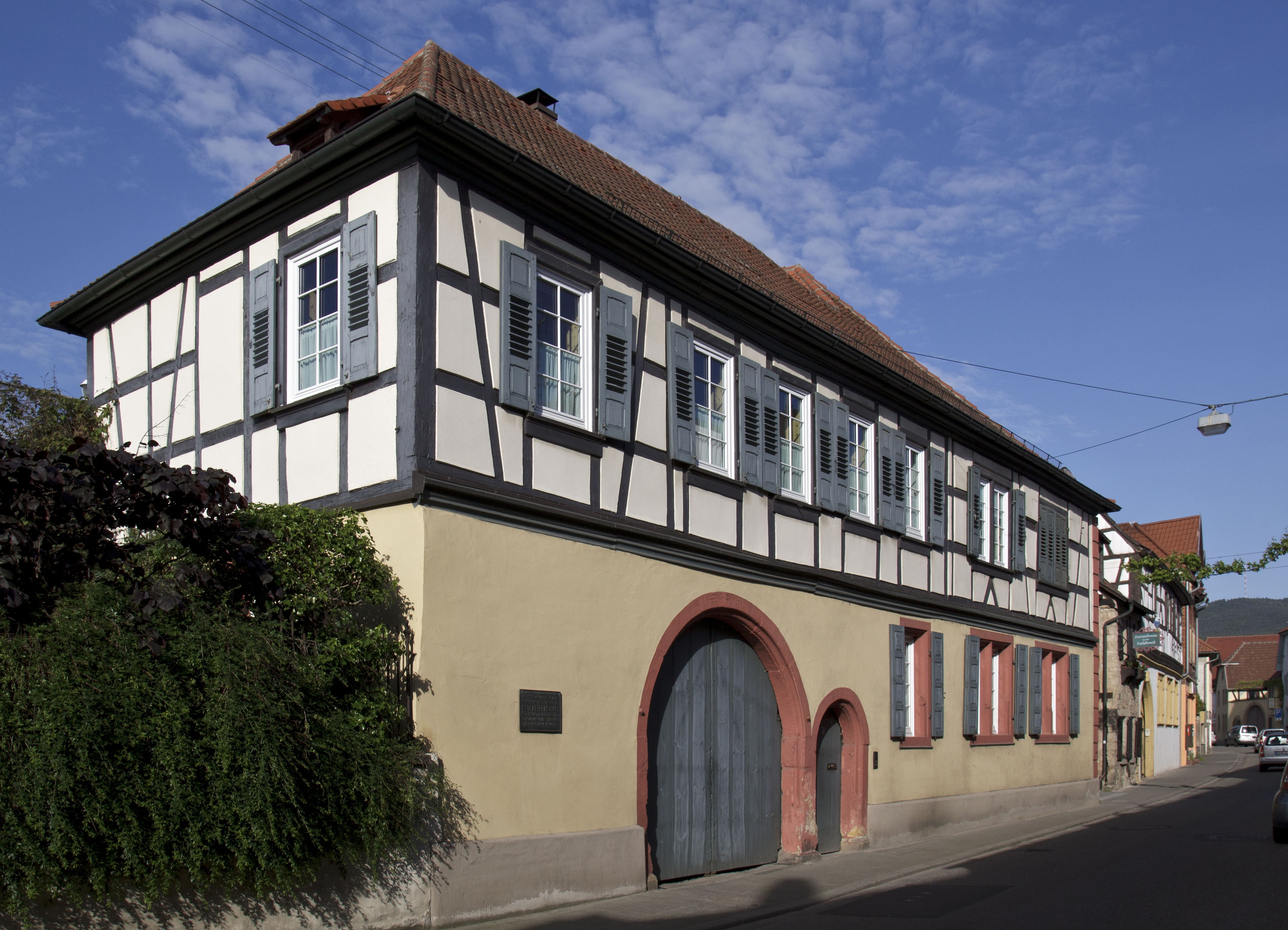 Neustadt an der Weinstraße Stadtteil Mußbach, Geburtshaus des deutschen Arztes Albert Fraenkel, der als Tuberkulose- und Herzforscher bekannt wurde